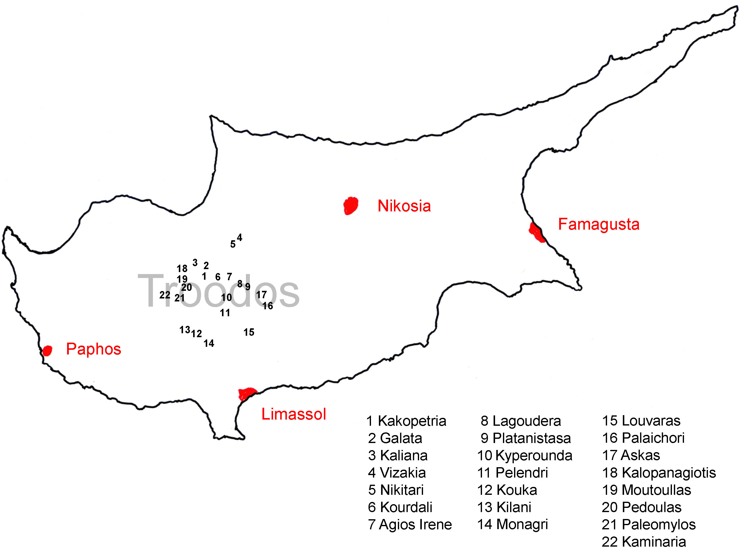 Karte von Zypern mit dem Troodos und 22 Dörfern mit Scheunendachkirchen